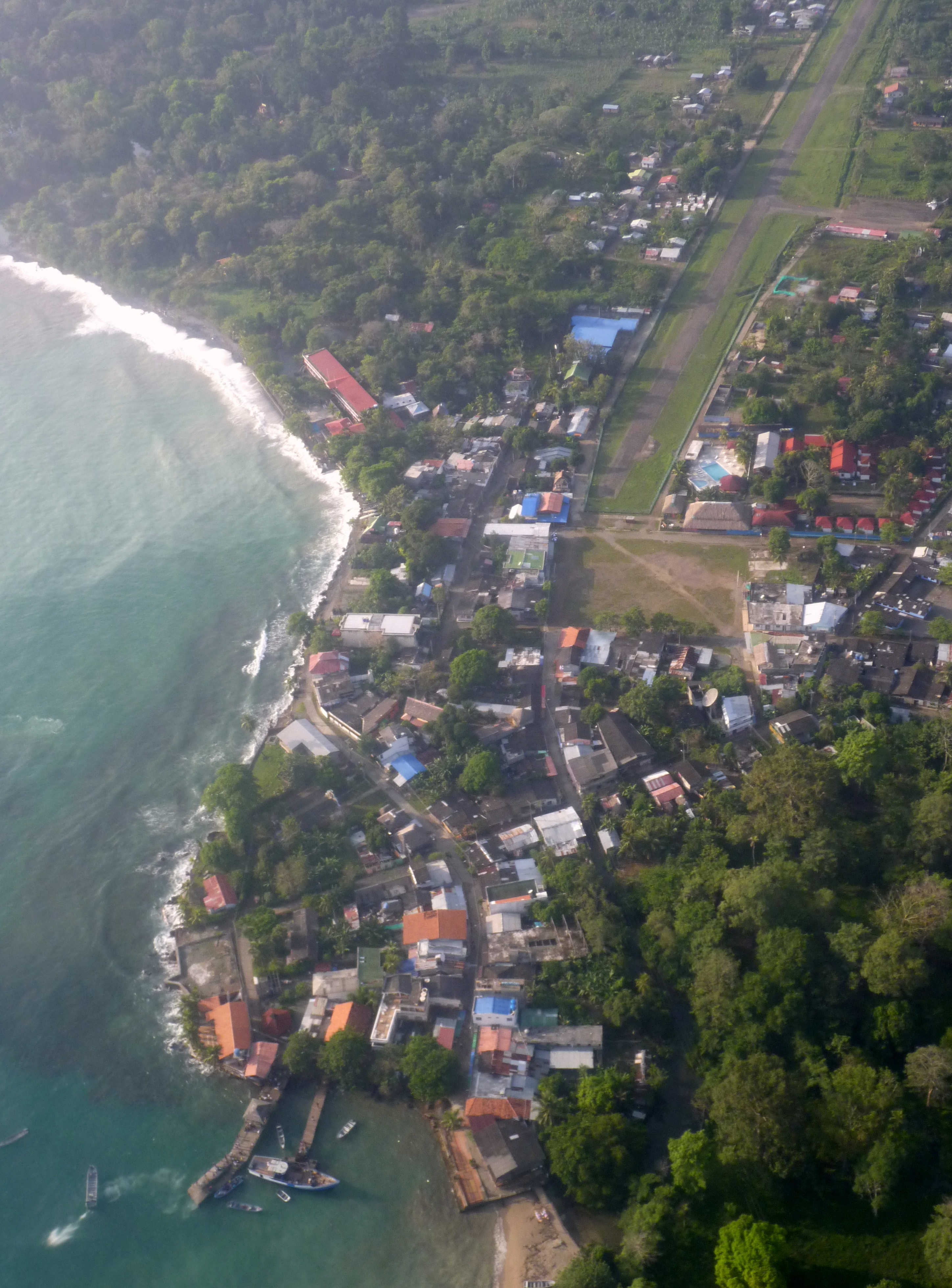 Capurganá es un sitio privilegiado que goza de playas tranquilas de arena blanca y algunas de piedra como la playa de los pescadores y la desembocadura del Río Capurganá; un mar de aguas azules y cristalinas custodiado por la imponente selva del Darién y los maravillosos amaneceres y atardeceres que configuran una mezcla perfecta entre mar y selva que la hacen una región única, seductora y mágica, para disfrutar las vacaciones